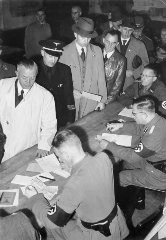 Das Volk steht auf! Schon in den frühen Morgenstunden des Sonntags[22.9.1944] drängen sich im ganzen Reich vor den Meldestellen des Volkssturmes Männer aller Schichten und Altersklassen, um sich in die Listen eintragen zu lassen. Der Arbeiter stand neben dem Geschäftsinhaber, der Handwerker neben dem Beamten. Bataillon auf Bataillon des Volkssturmes ist so am ersten Meldetag entstanden, eine nicht zu übersehende Warnung für unsere Feinde. Scherl Bilderdienst (Hoffmann) 23.10.1944